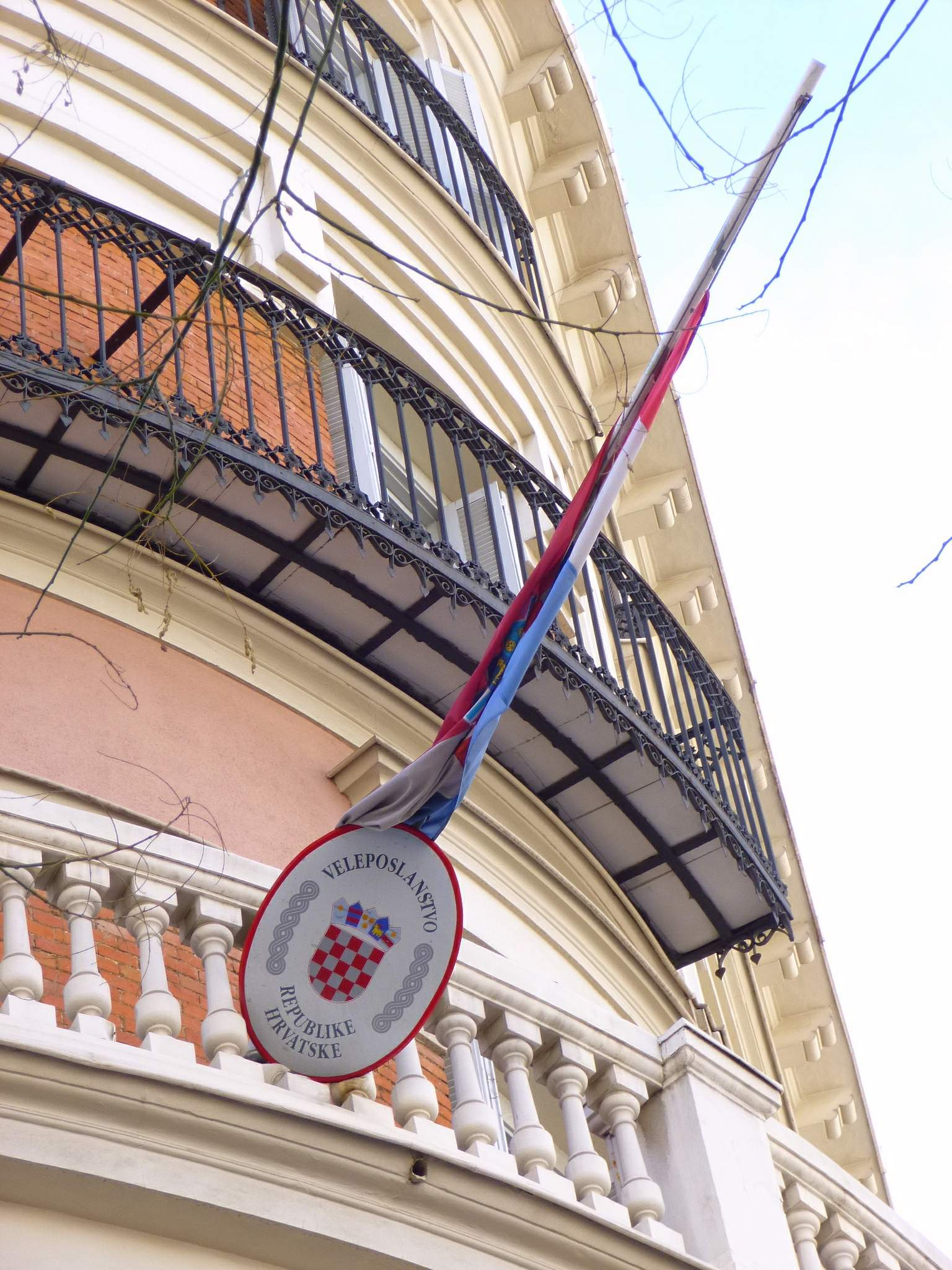 Embajada de Croacia en Madrid